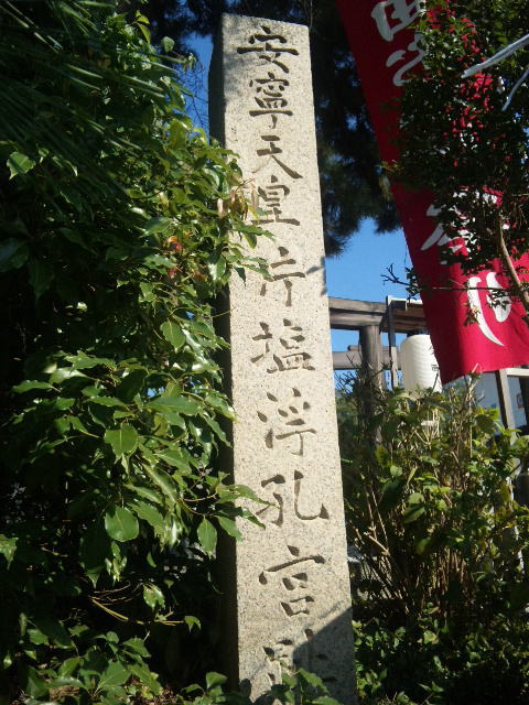 石園座多久虫玉神社の石碑